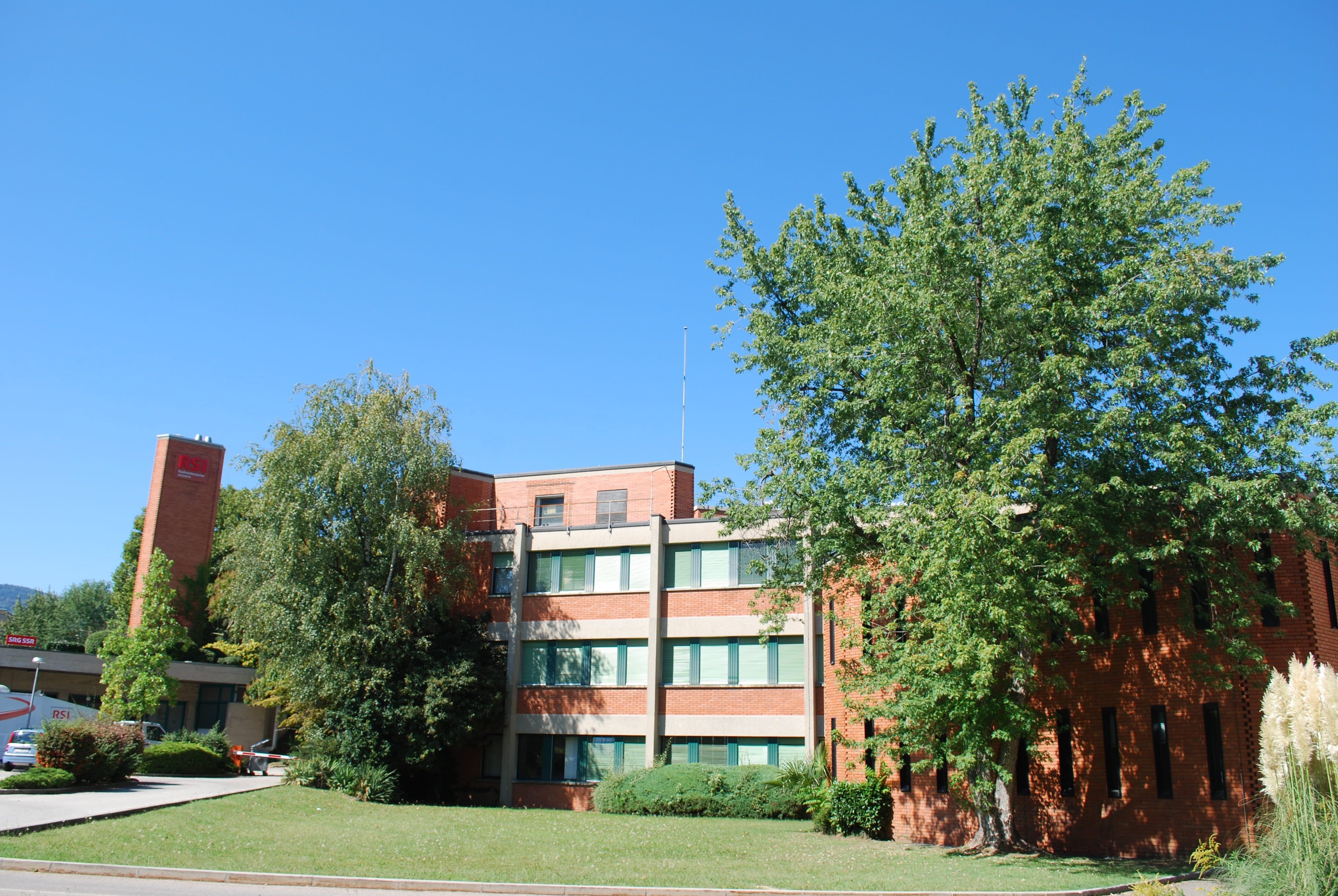 Studio radio Rsi, panoramica del complesso verso sud